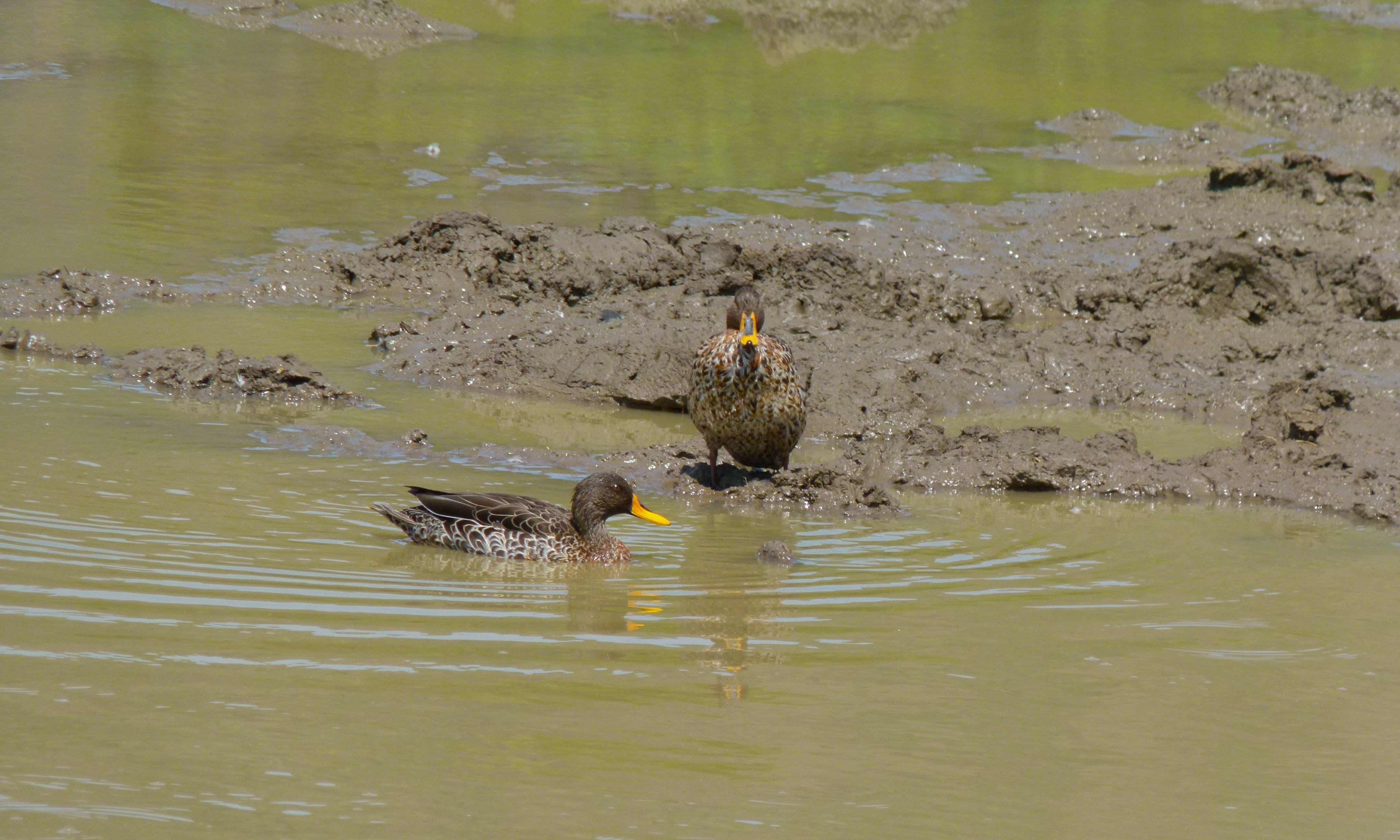 Ratlhogo Waterhole, Pilanesberg NP, SOUTH AFRICA